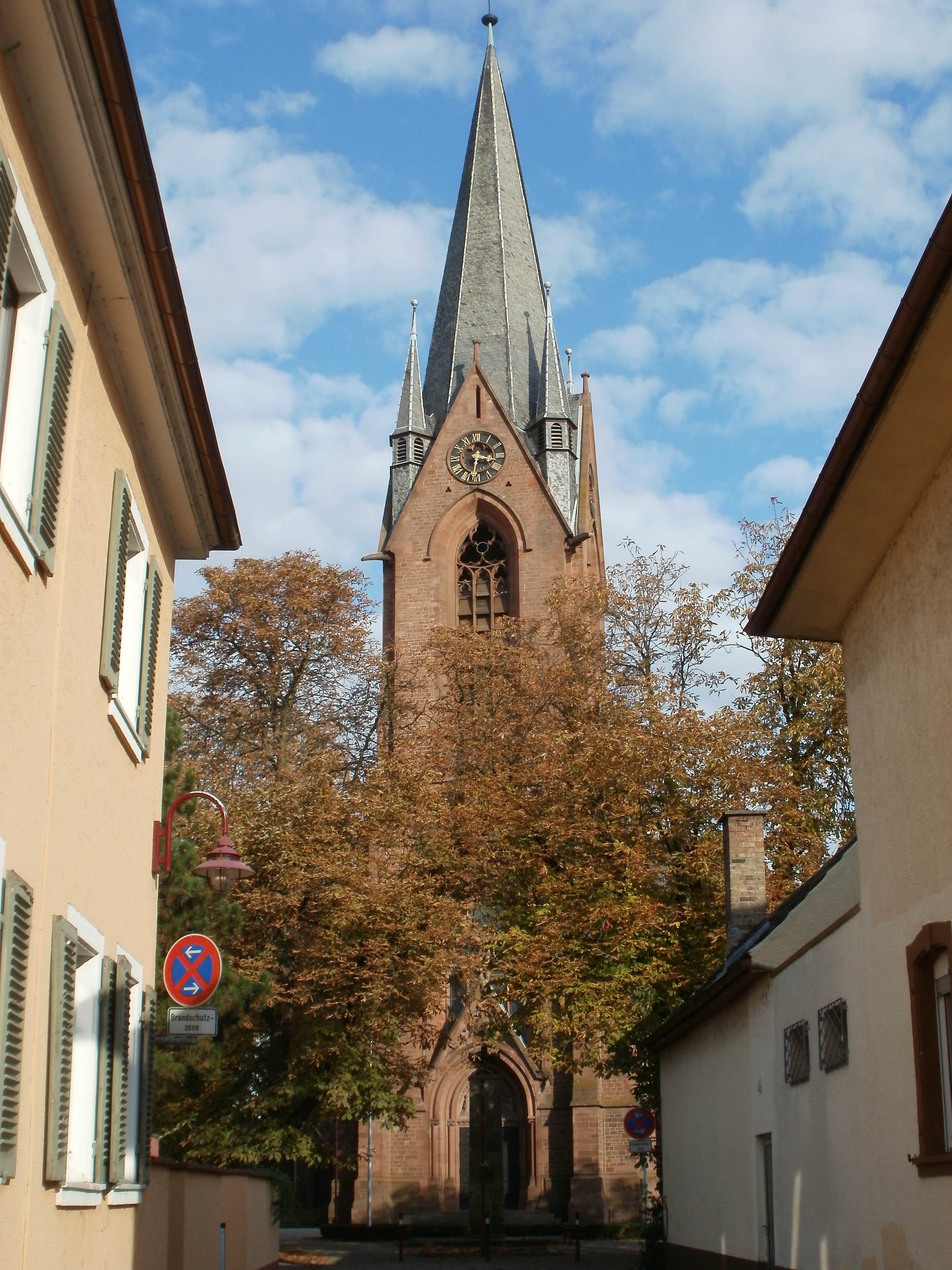 St. Vitus (Rheinsheim)